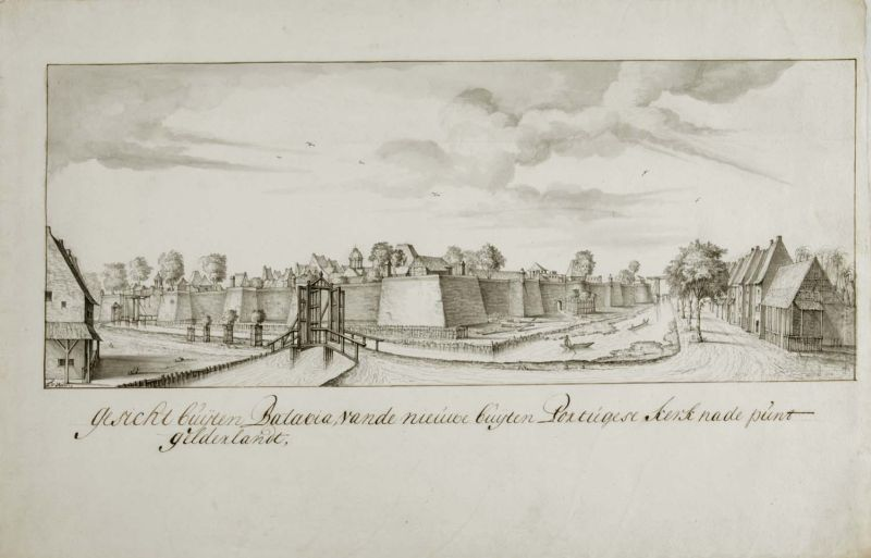 Tekening. Op de voorgrond de zogenaamde Jassenbrug en het meest zuidoostelijke bastion Gelderland. Het torentje in het midden in de stad is van het in 1709 nog in aanbouw zijnde nieuwe stadhuis (voltooid 1710).. De stadsmuren van Batavia met de Buiten Portugese kerk